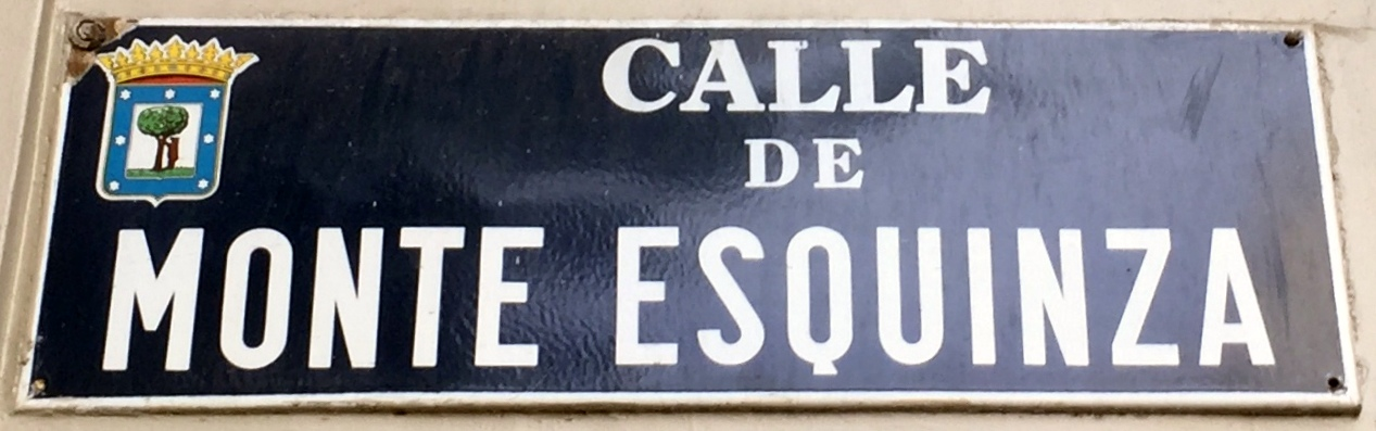 Placa calle monte esquinza